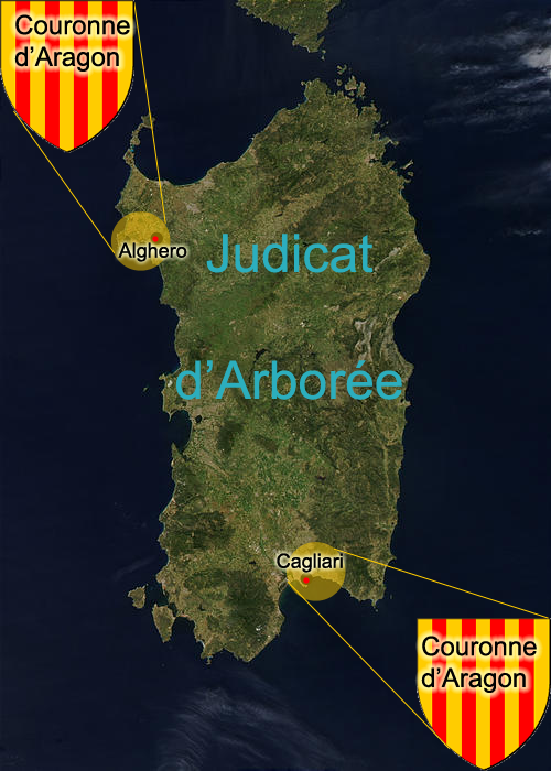 Expension du judicat d'arborée avant sa chute provoquée par la couronne d'Aragon en 1409. Je suis l'auteur de l'image. J'ai utilisé: image:Armas de Aragon.png it: Immagine:Sardinia satellite.jpg qui se trouve dans Sardegna.